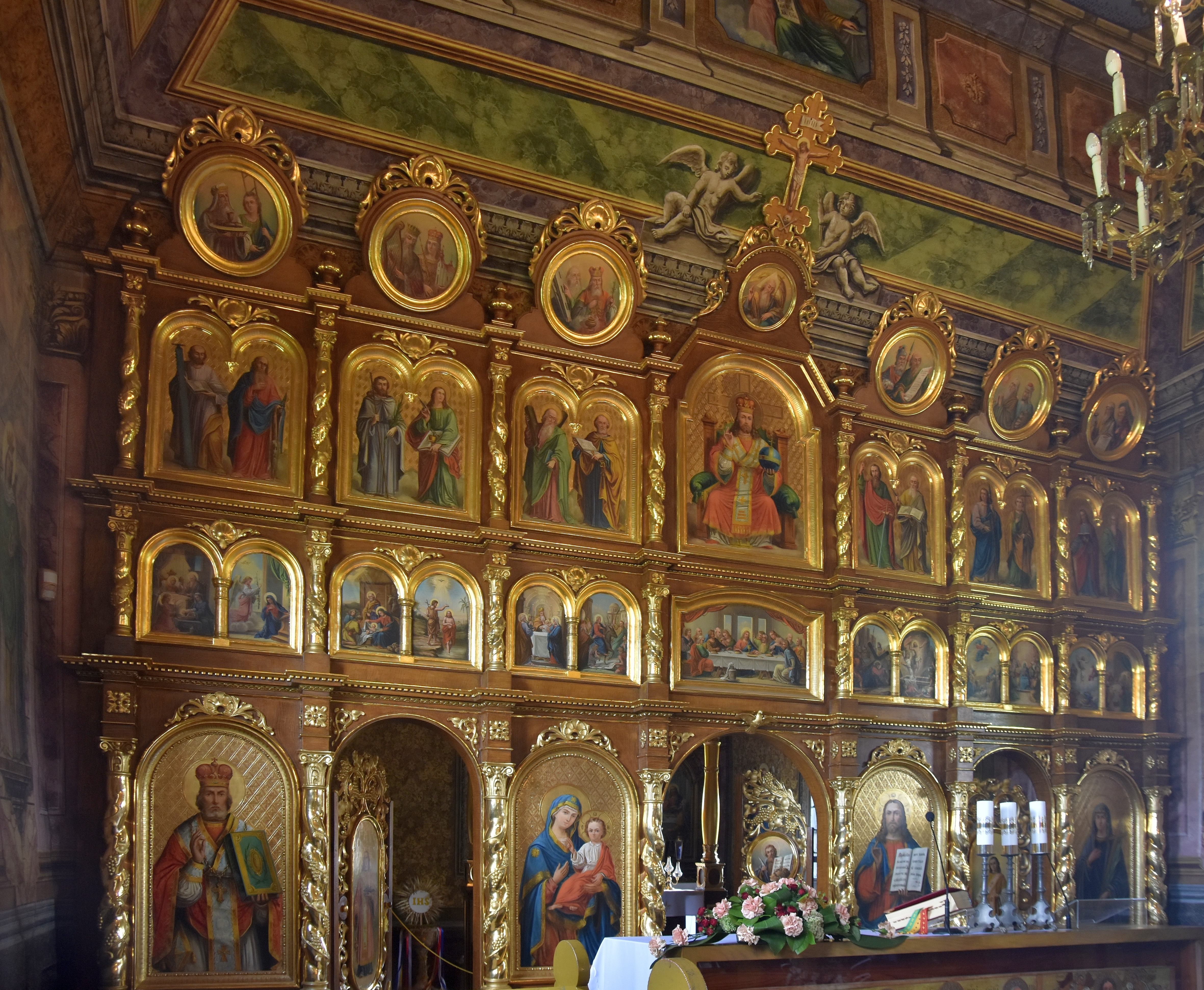 Kwiatoń, Cerkiew św. Paraskewy w Kwiatoniu